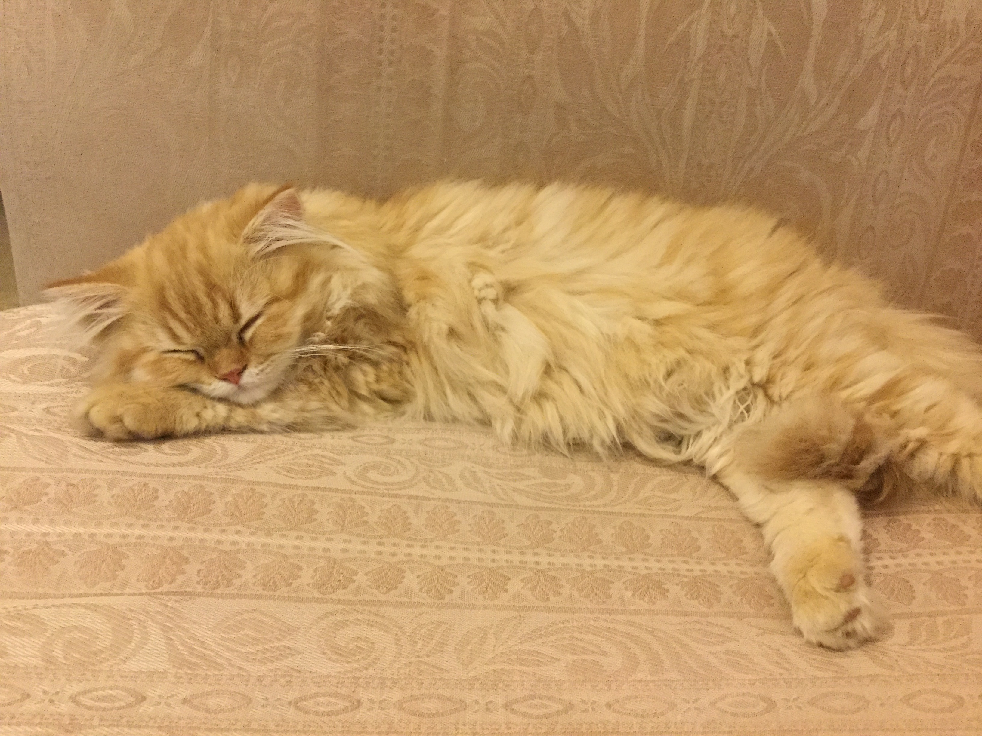 חתולה מנמנמת